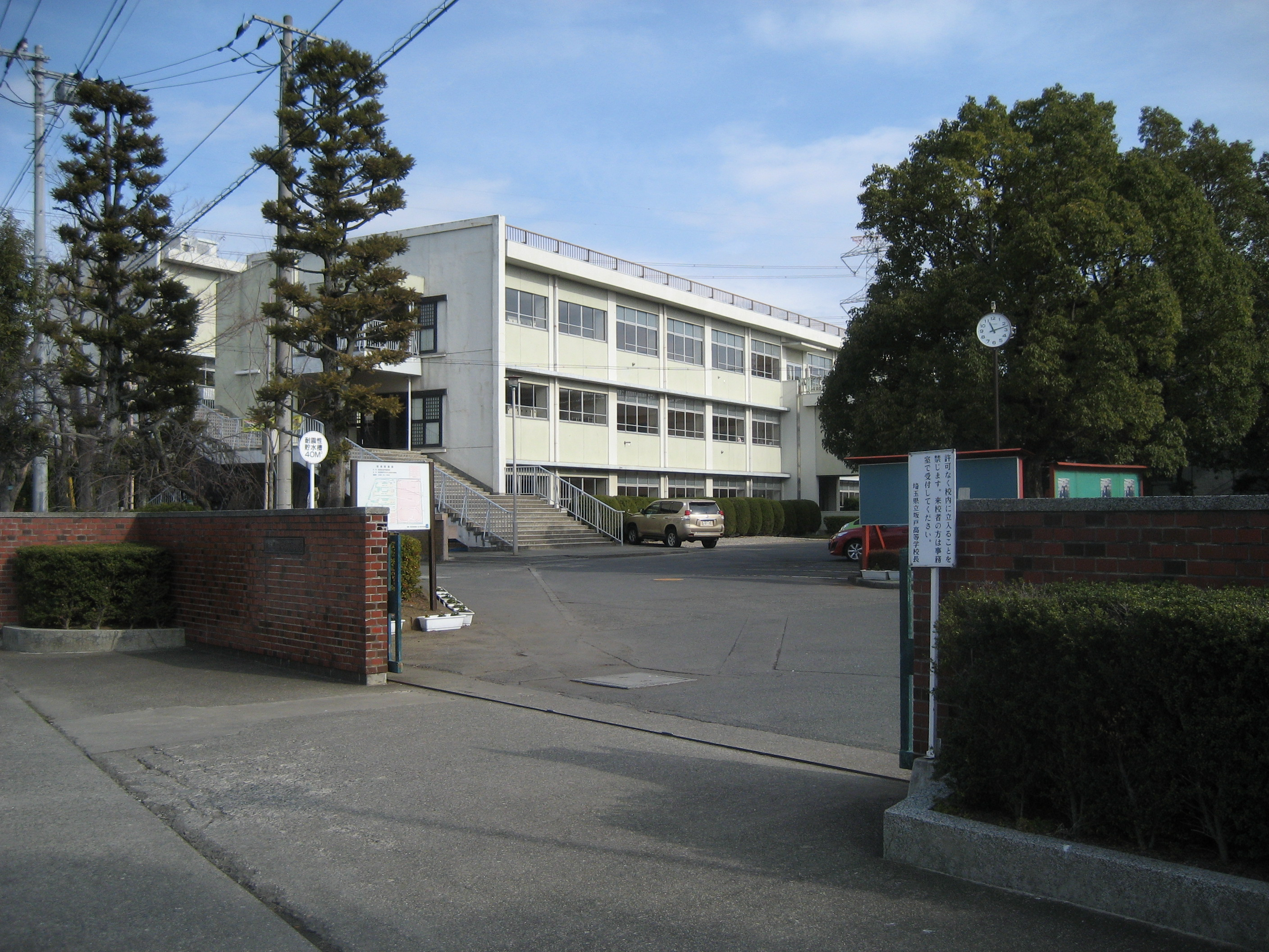 埼玉県立坂戸高等学校（正門付近を撮影）